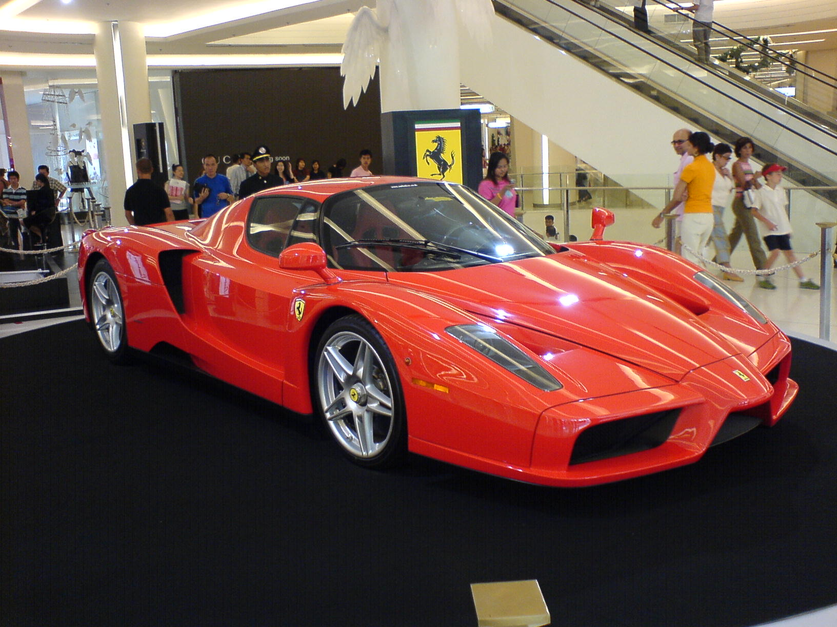 Ferrari Enzo im Siam Paragon Shoppingcenter Bangkok